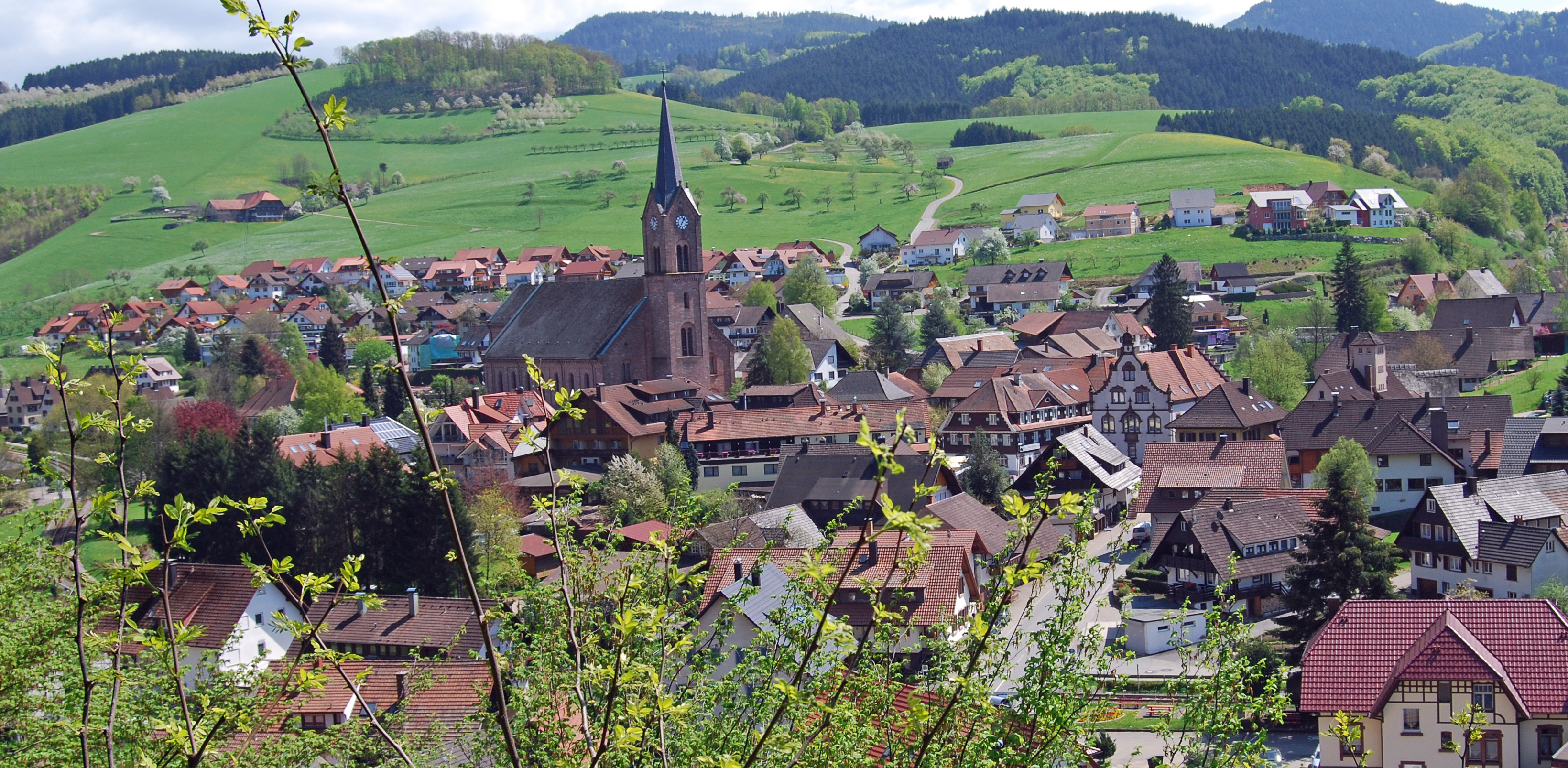 Oberharmersbach